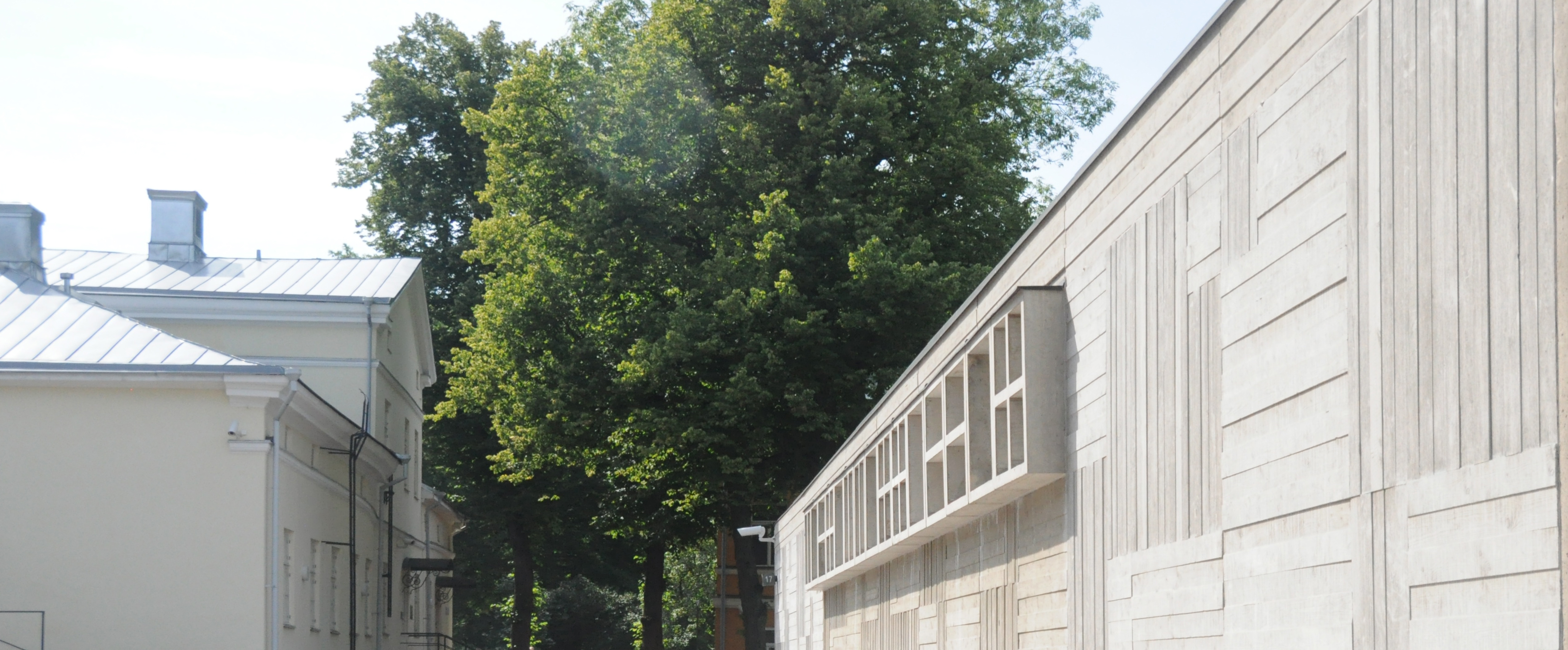 Yksityiskohta Woldemar Baeckmanin arkkitehtuurista